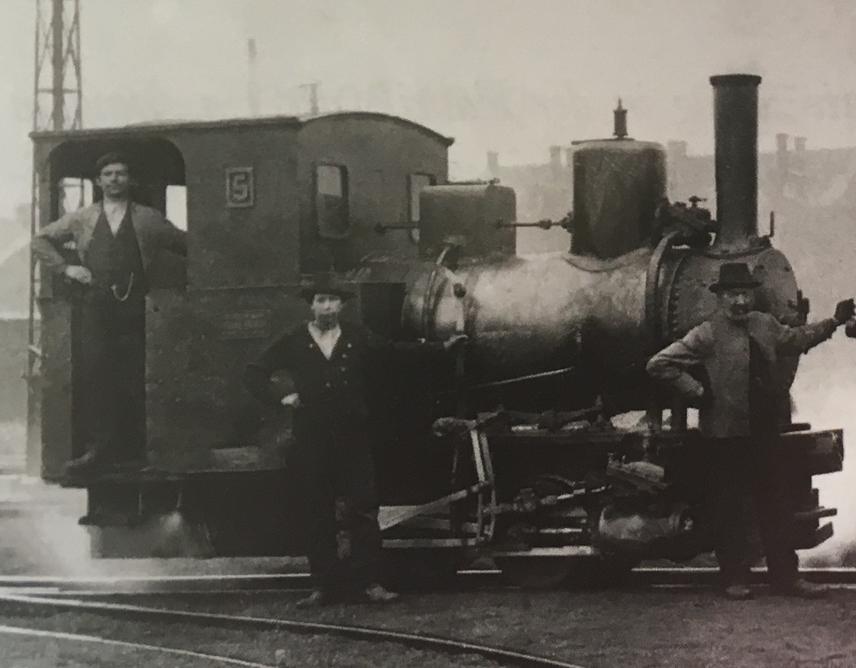 Hoesch 5 (800 mm), Hagans ?/1894 (um 1900)